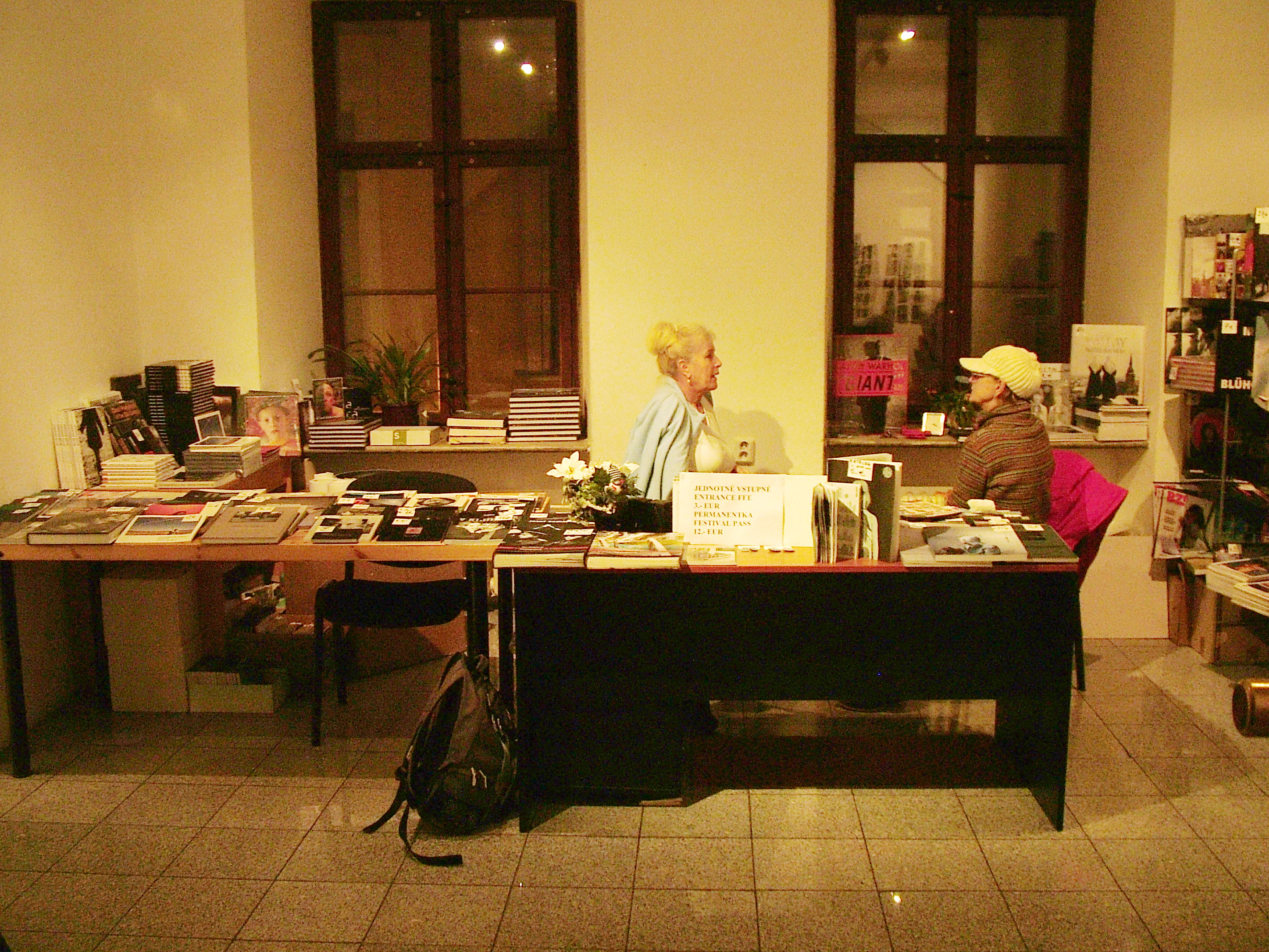 Výstava fotografií, Středoevropský dům fotografie (Stredoeurópsky dom fotografie), listopad - prosinec 2011 Středoevropský dům fotografie (Stredoeurópsky dom fotografie)